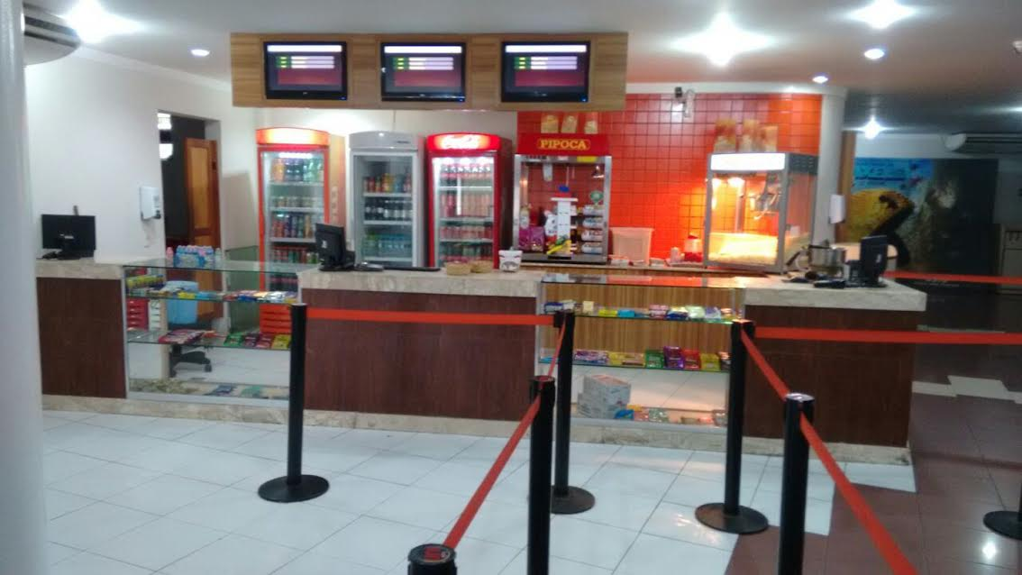 Bomboniere do Cinemagic Araruama